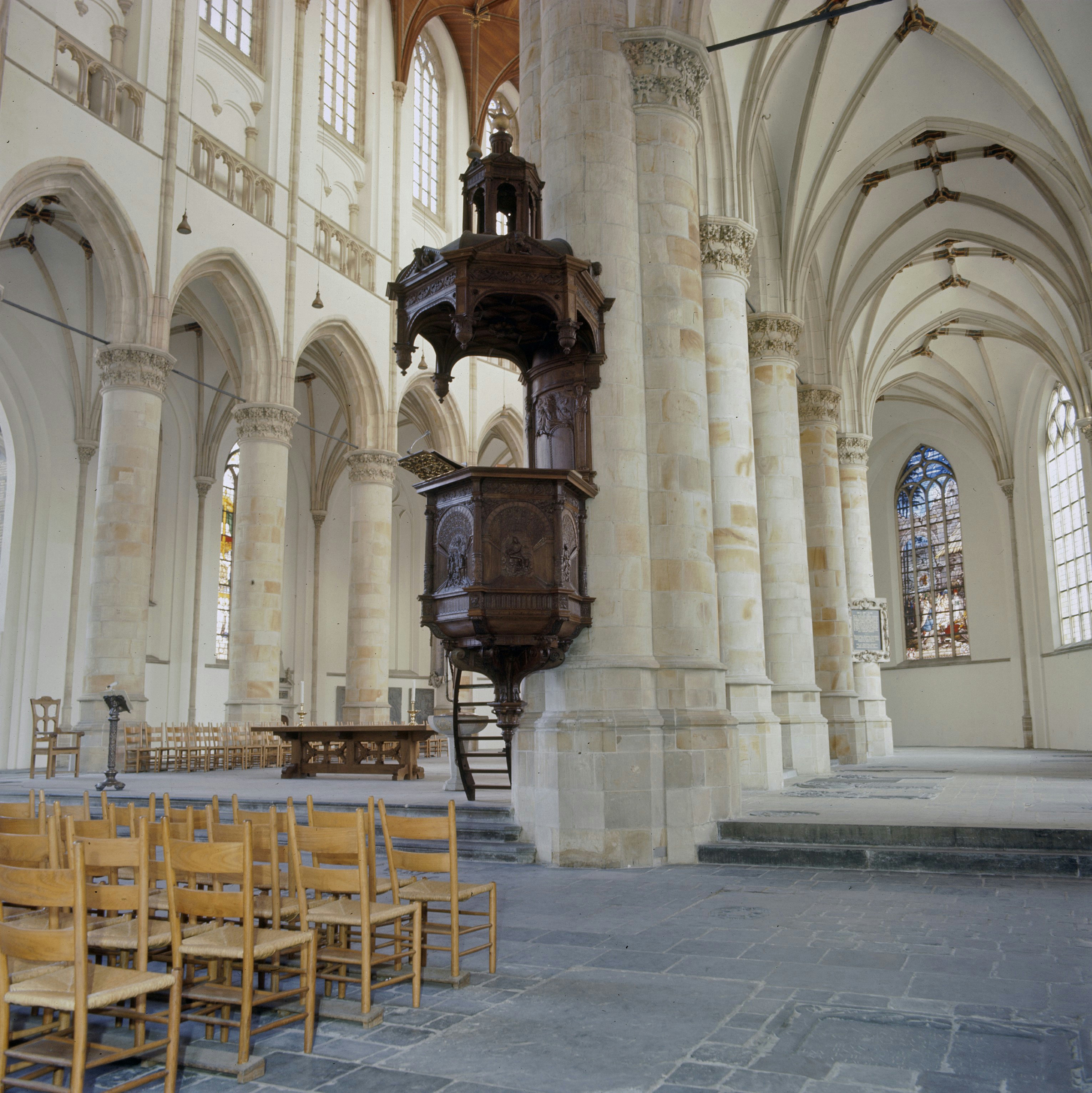 Sint Jacobskerk: Interieur, overzicht van de preekstoel met zicht op het altaar en de zuidelijke kooromgang